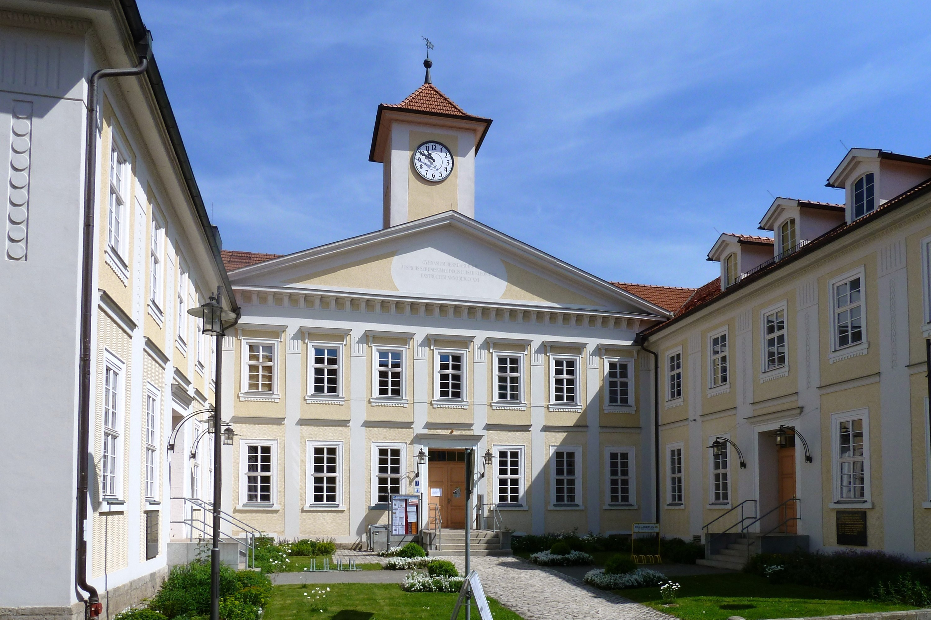 Gebäude des ehemaligen Gymnasiums Bernhardinum in Meiningen, 1945—1963 Henfling-Gymnasium, danach Polytechnische Oberschule „Rudolf Baumbach“, heute Volkshochschule.